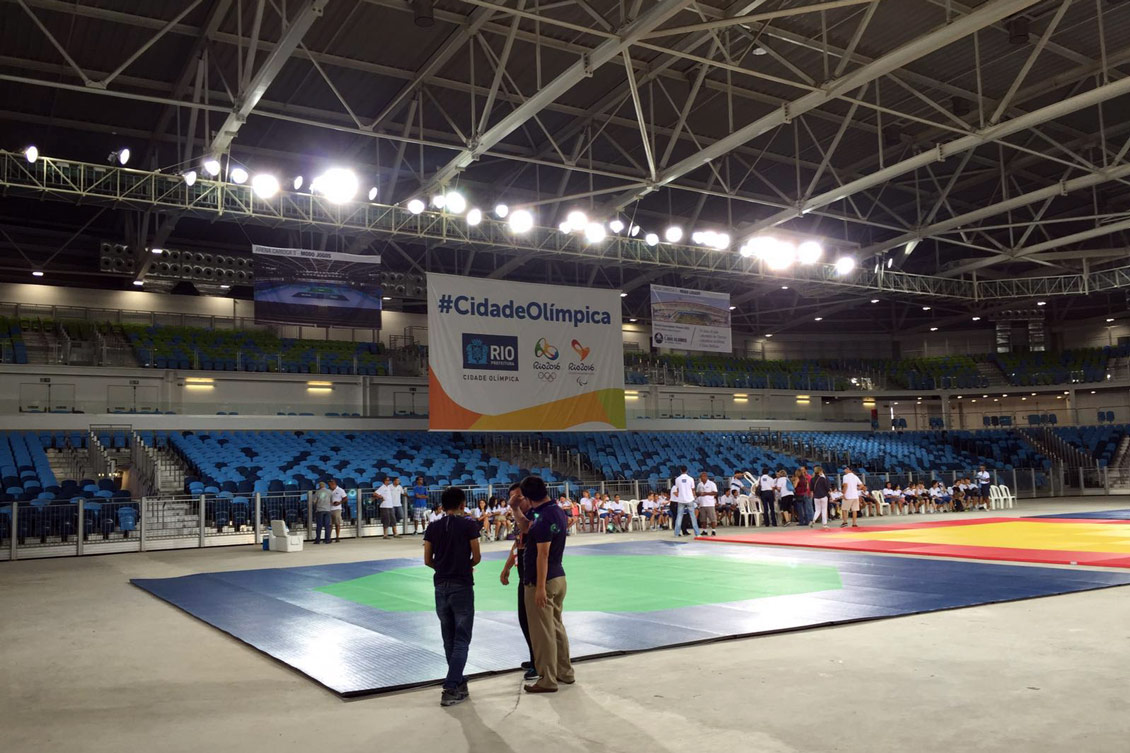 Arena Carioca 3 Rio de Janeiro, Brasil. Foto: Carol Delmazo/brasil2016.gov.br